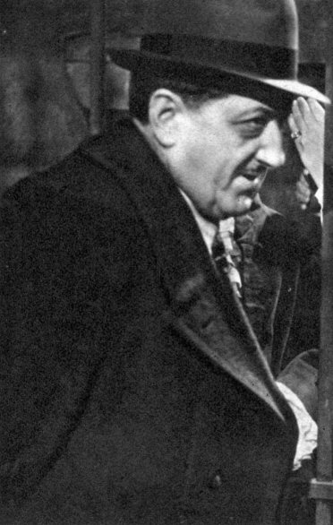 photo from Italian magazine Cinema, V, 92, 25 April 1940, p. 286.